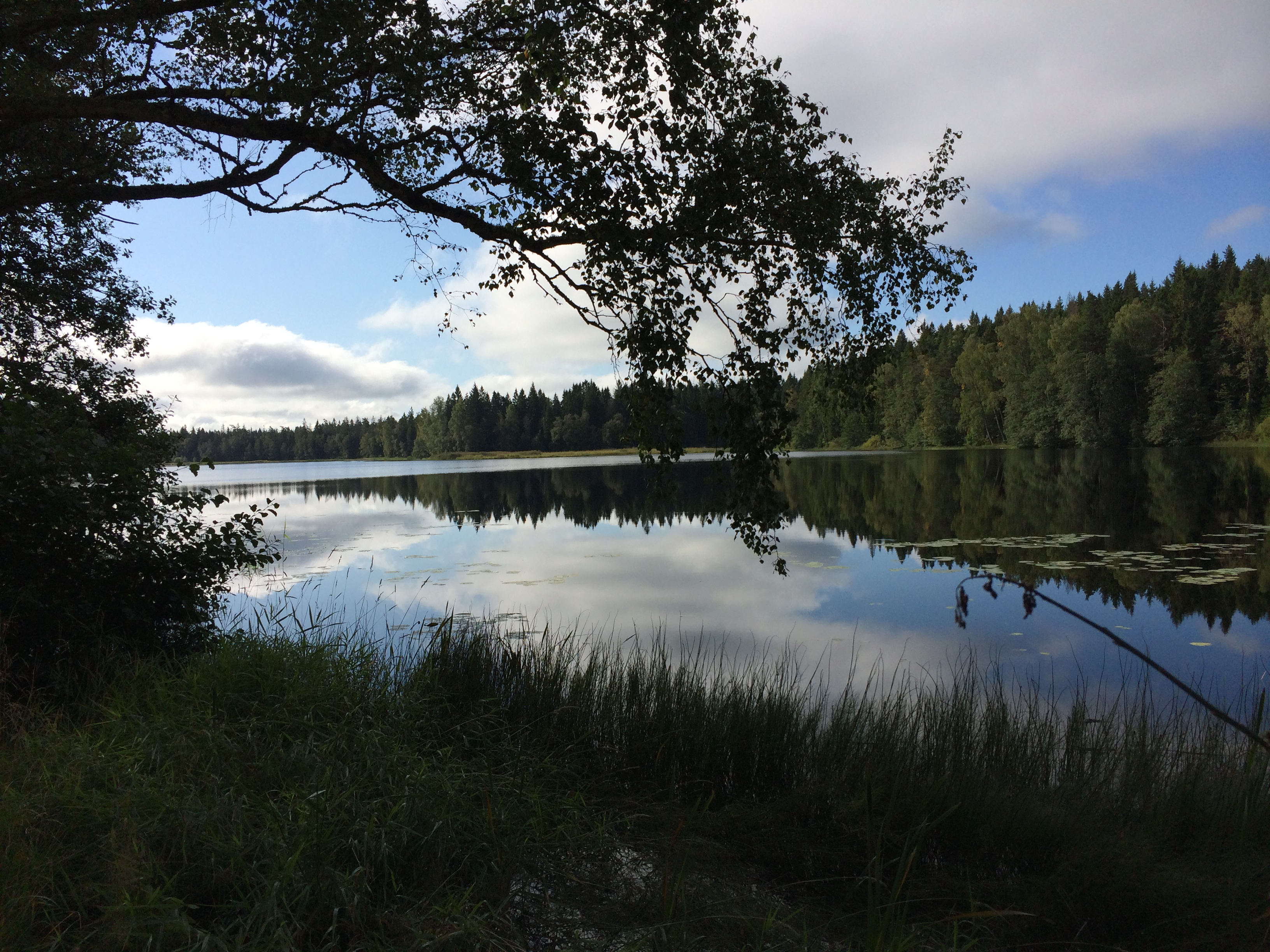 Eldmörjan, Hunneberg